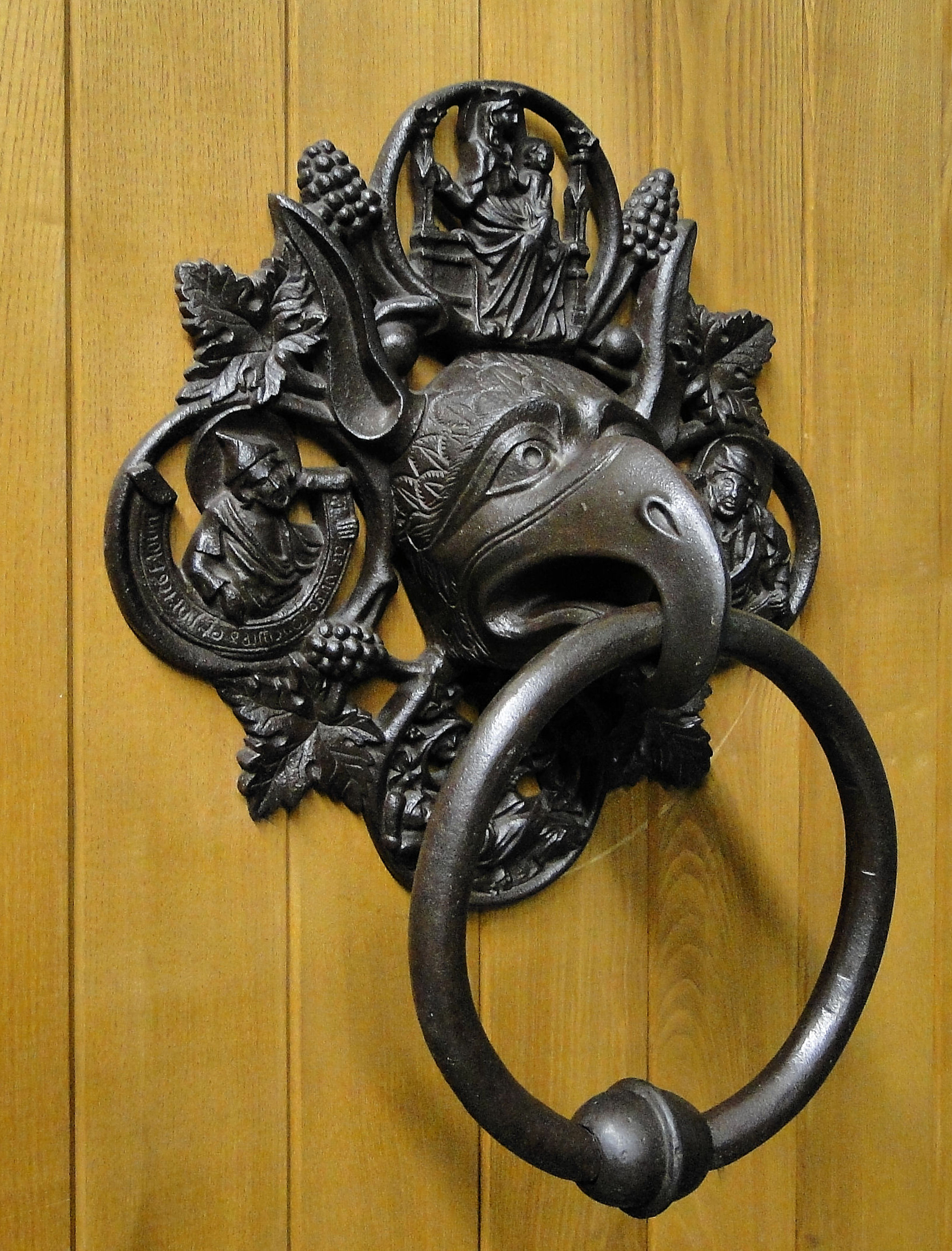 Johann Apengeter (XIII/XIV w.) Antaba z głową gryfa z zamku książęcego w Szczecinie (kopia z 1823 r.) - żeliwo. Obecnie eksponat Muzeum Narodowego w Szczecinie.